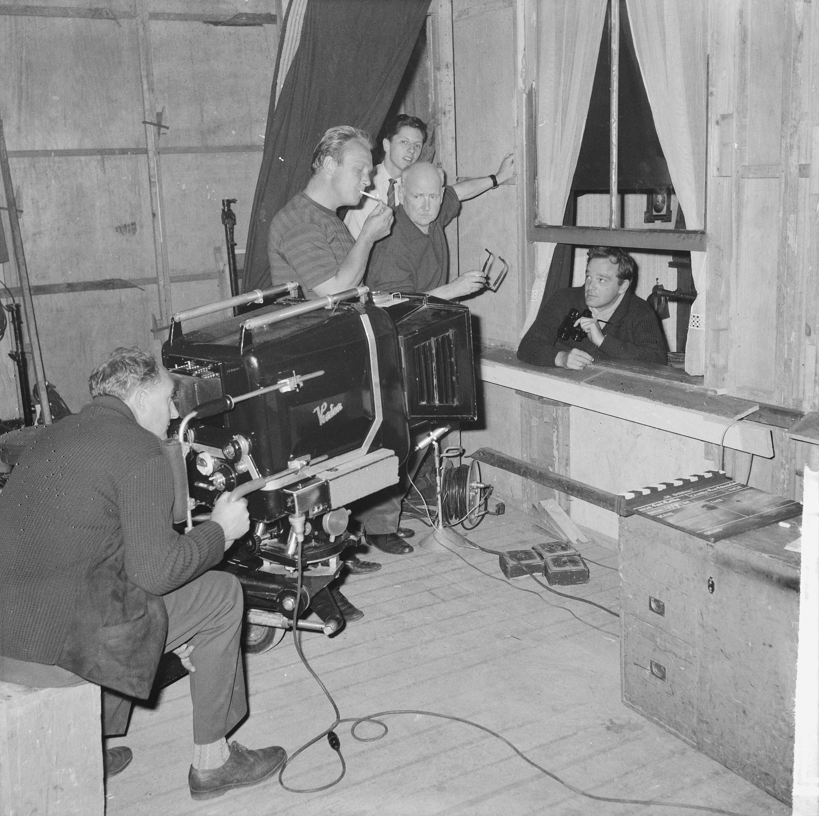 Collectie / Archief : Fotocollectie Anefo Reportage / Serie : [ onbekend ] Beschrijving : De overval in de Cinetonestudio begonnen, achter de camera Prosper Dekeukeleire, Kees Brusse, Paul Rotha, in het raam Jan Blaaser Datum : 10 september 1962 Persoonsnaam : Blaaser, Jan, Brusse, Kees, Dekeukeleire, Prosper, Rotha, Paul Fotograaf : Nijs, Jac. de / Anefo Auteursrechthebbende : Nationaal Archief Materiaalsoort : Negatief (zwart/wit) Nummer archiefinventaris : bekijk toegang 2.24.01.03 Bestanddeelnummer : 914-2916